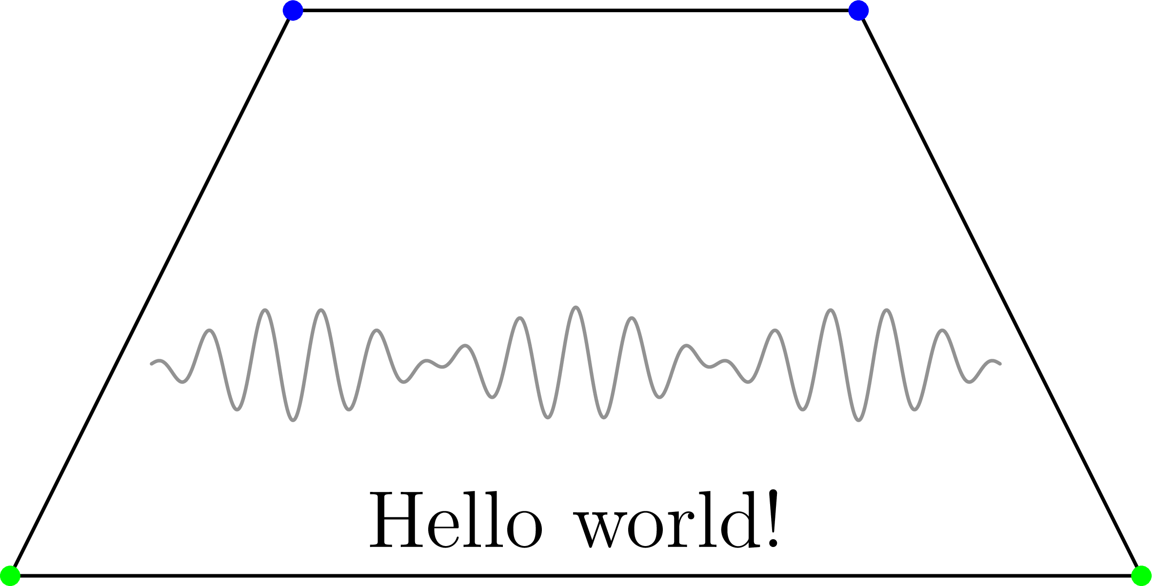 Einfache Asymptote Grafik